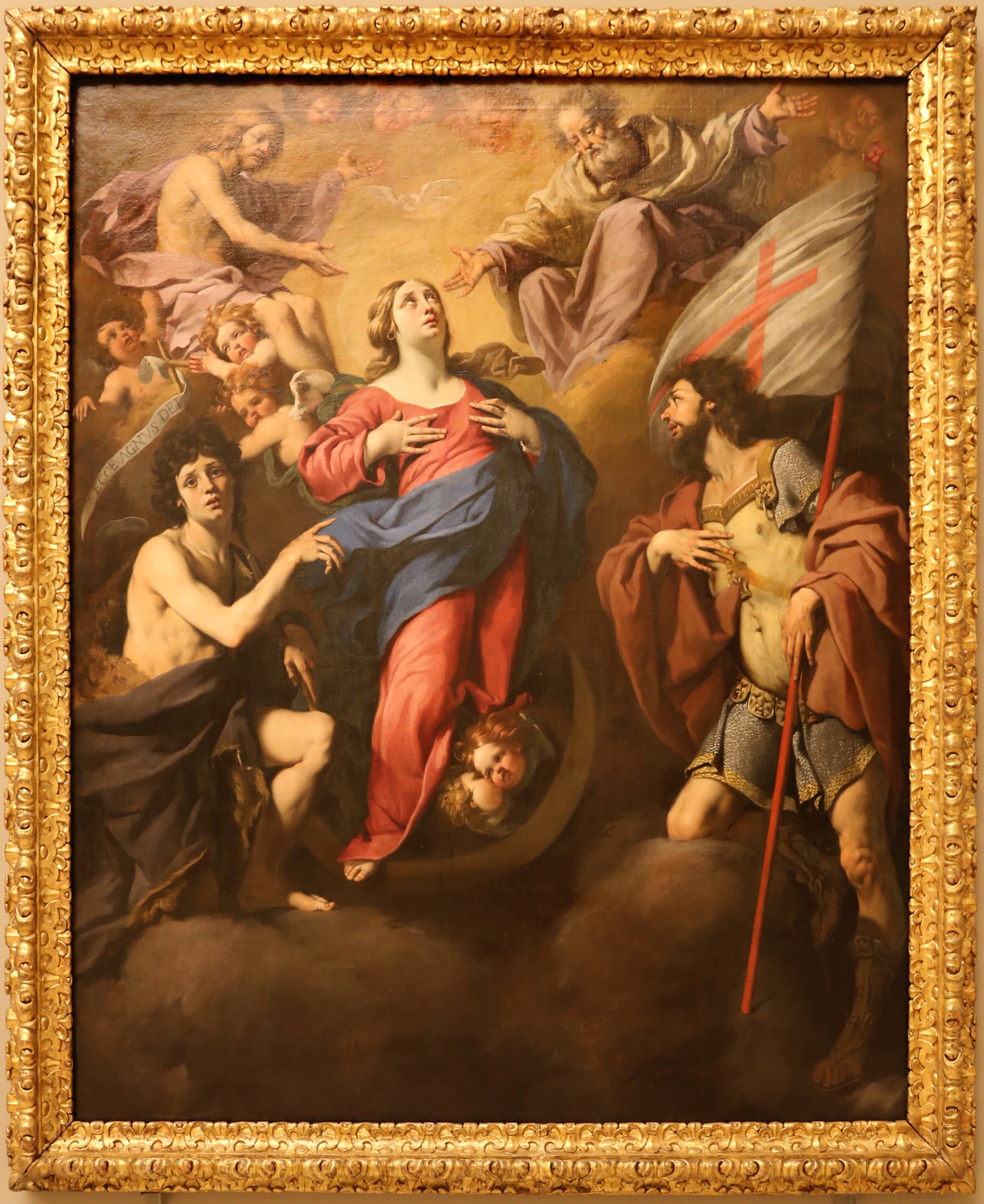 Palazzo dei Musei (Modena) This is a photo of a monument which is part of cultural heritage of Italy.